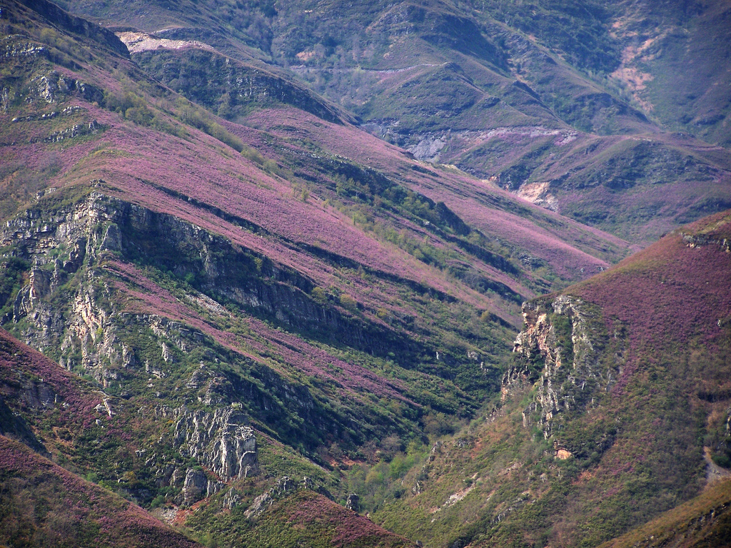 Vista cara ó sur desde un monte en Hórreos (San Pedro), concello de Folgoso do Courel